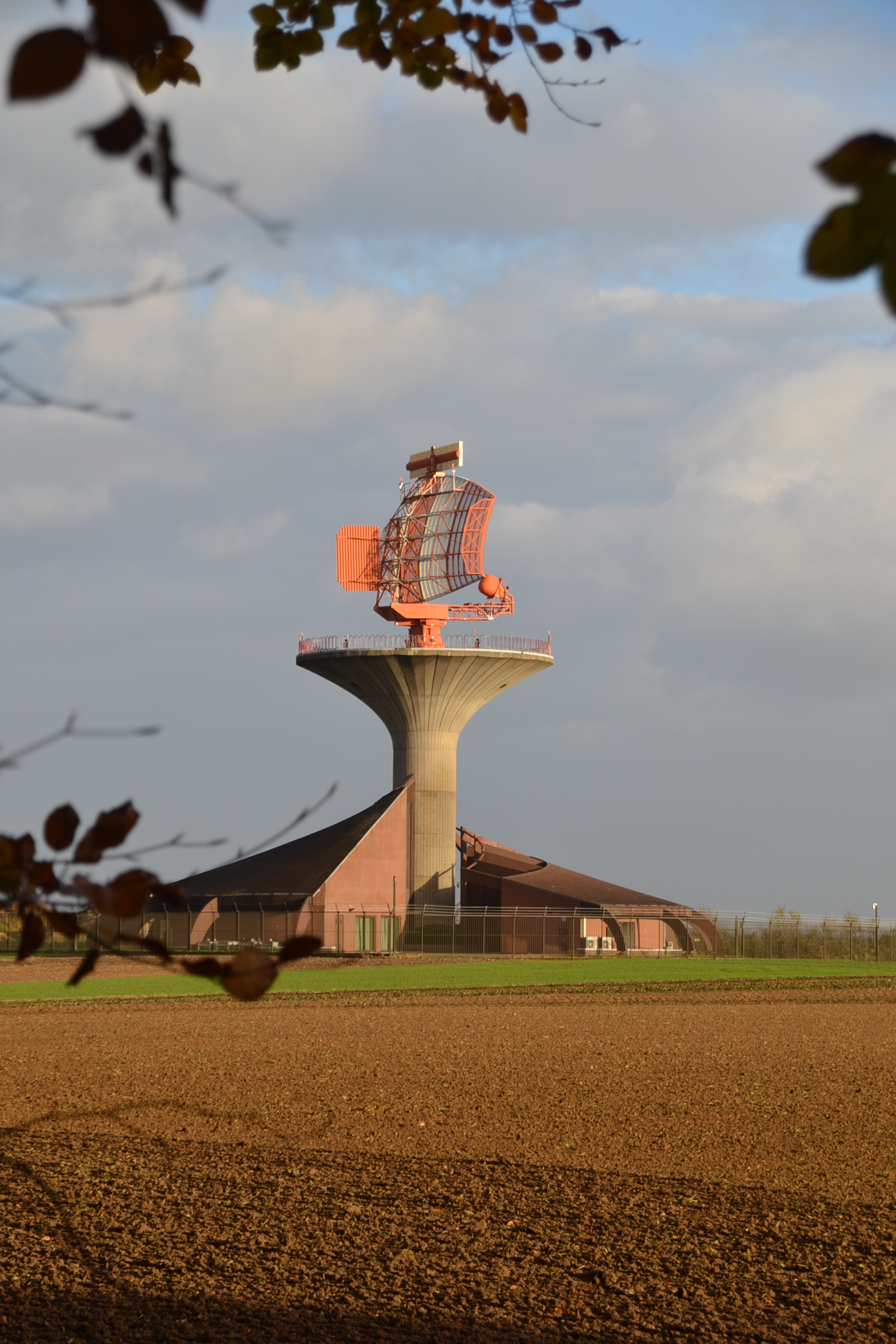 Radar station of Bertem